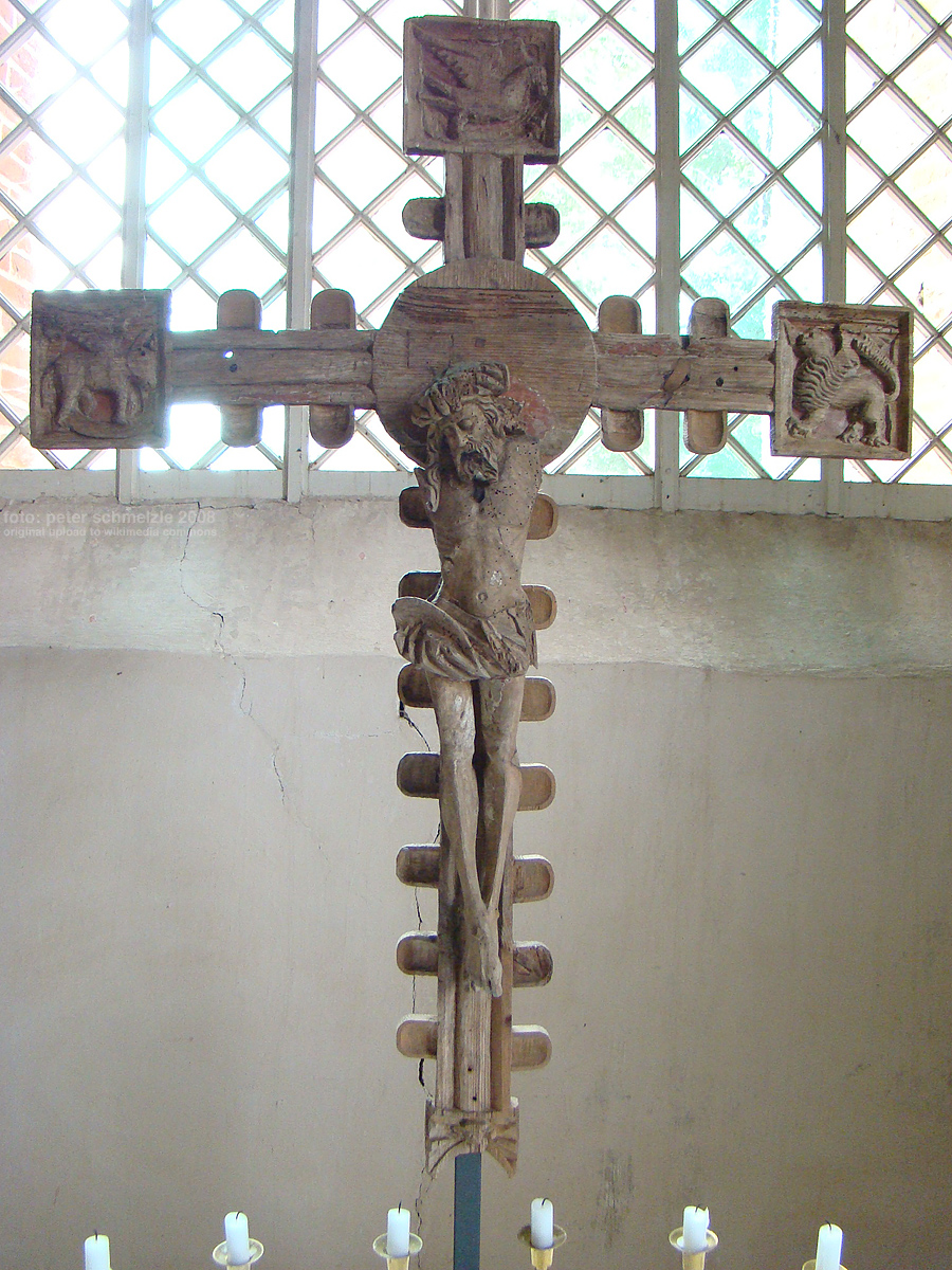 Holzfigur 15. Jhd., Kirche in Faulenrost-Rittermannshagen